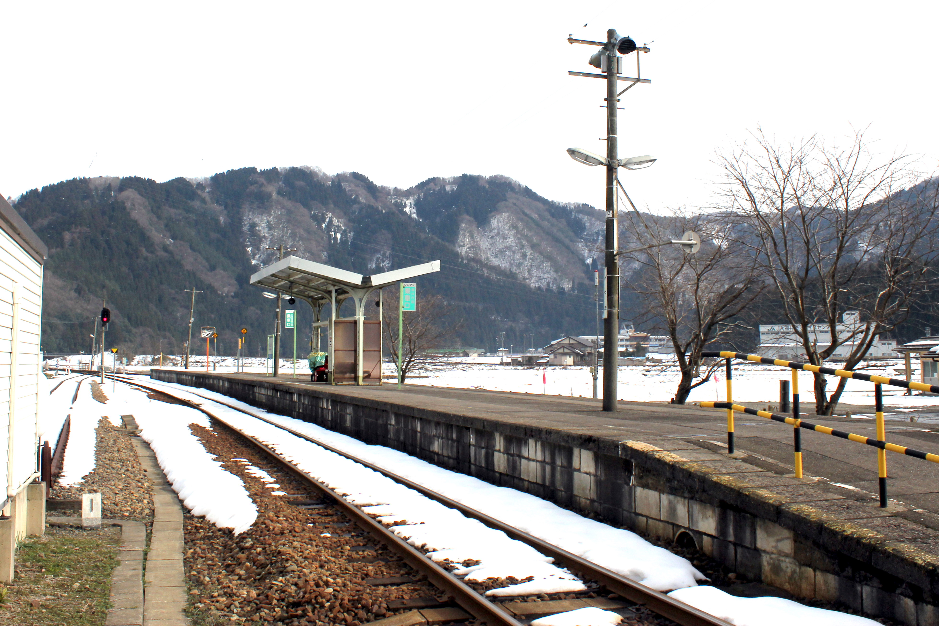 美山駅ホーム全景(2014冬)